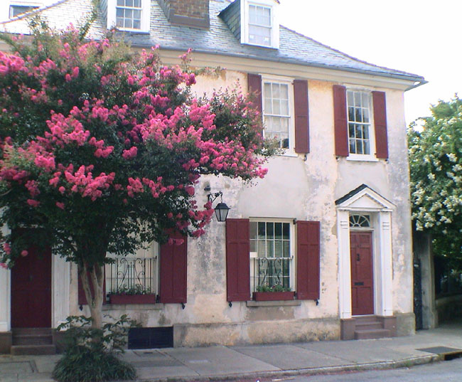 Charleston, Karolina Południowa, USA. (2004). Autor zdjęcia: Meerakh